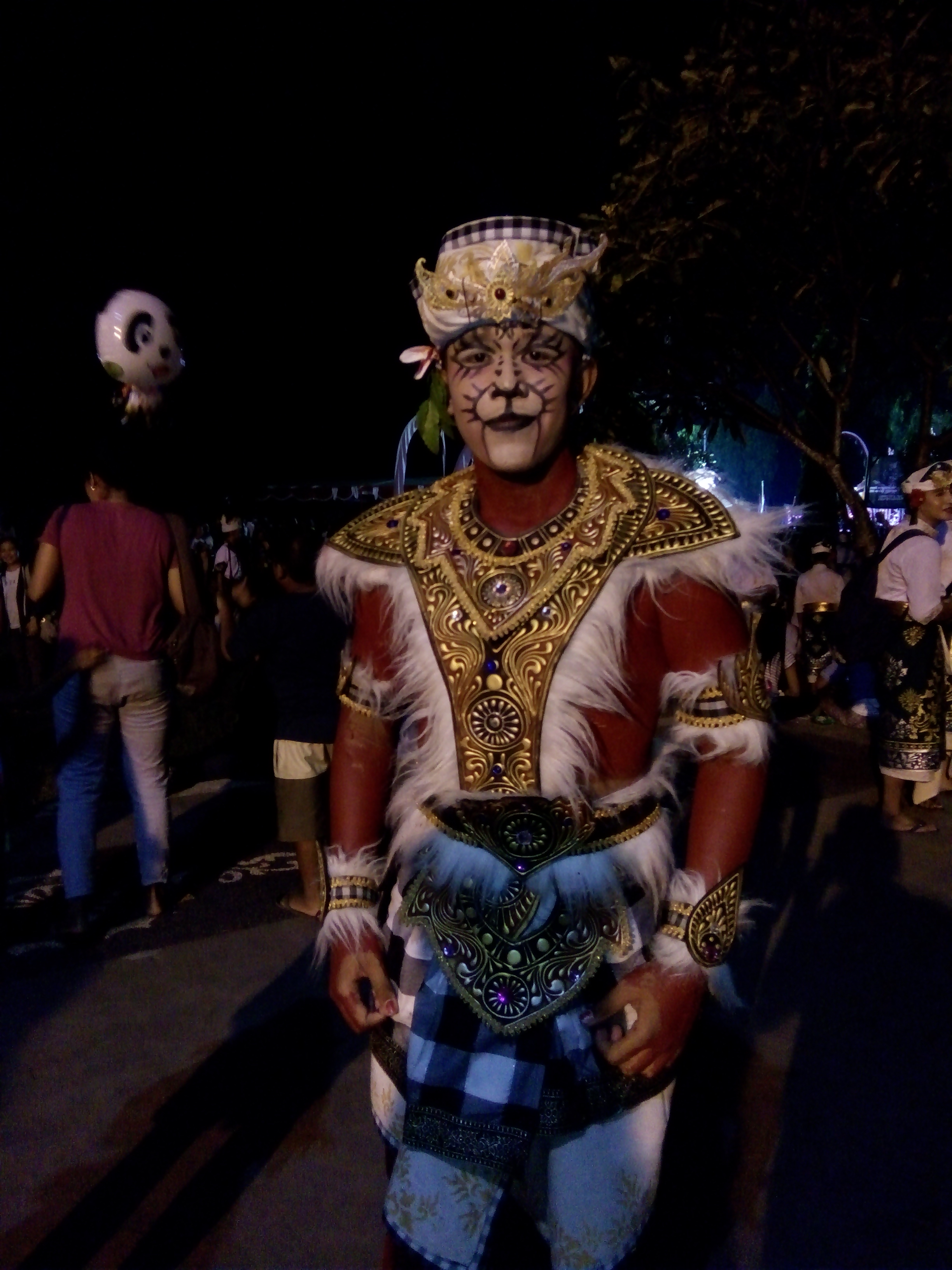 Peserta Teruna Baleganjur Denpasar, 13 April 2019